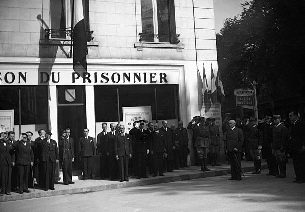 Inauguration de la Maison du prisonnier par le maréchal Pétain à Vichy en 1942.